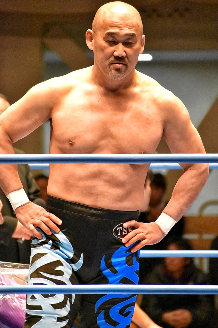 プロレスラーの長井満也